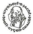 Drukkersmerk van de firma Thieme & Cie